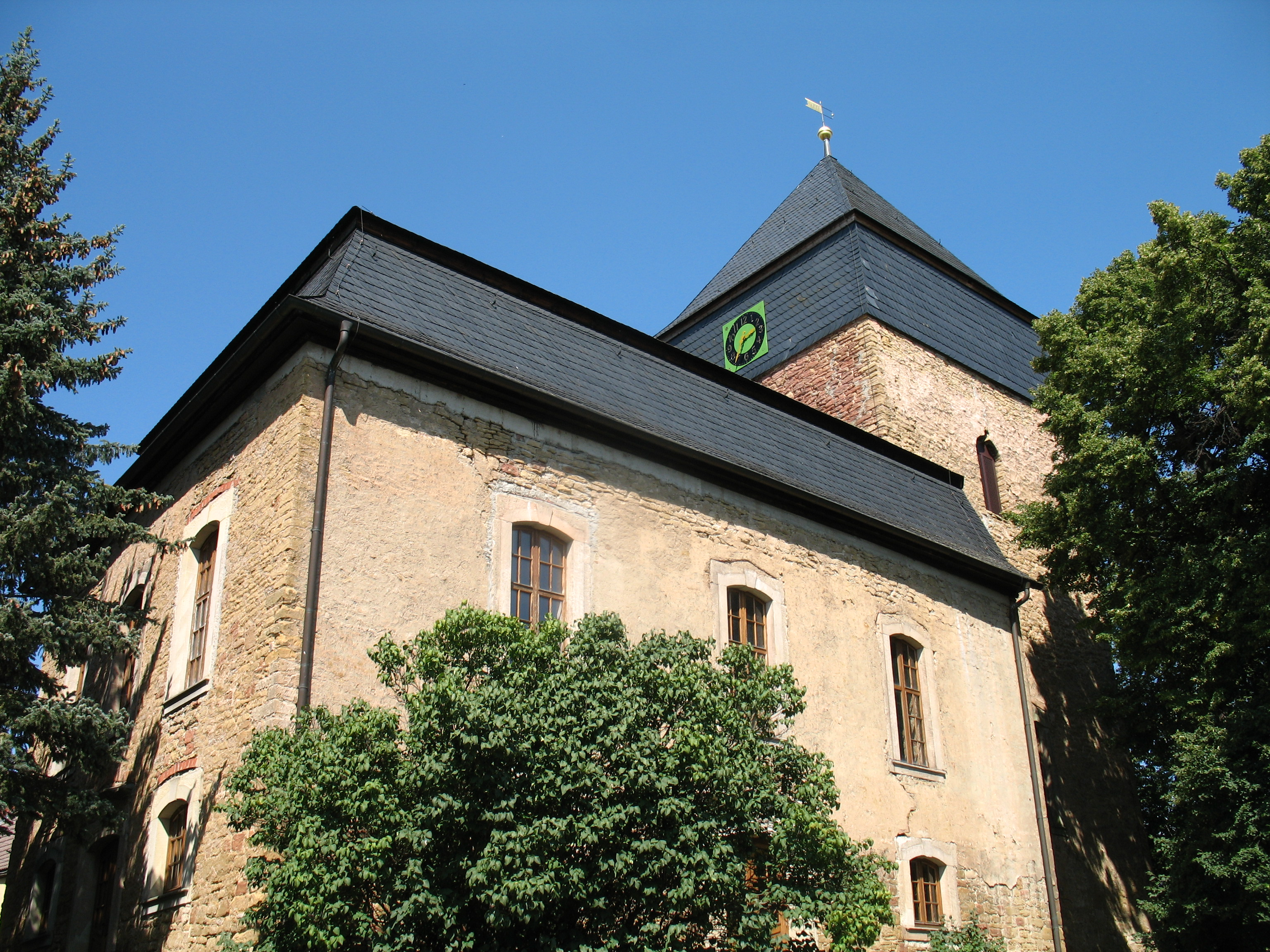 Kirche in Nermsdorf, Thüringen Unknown